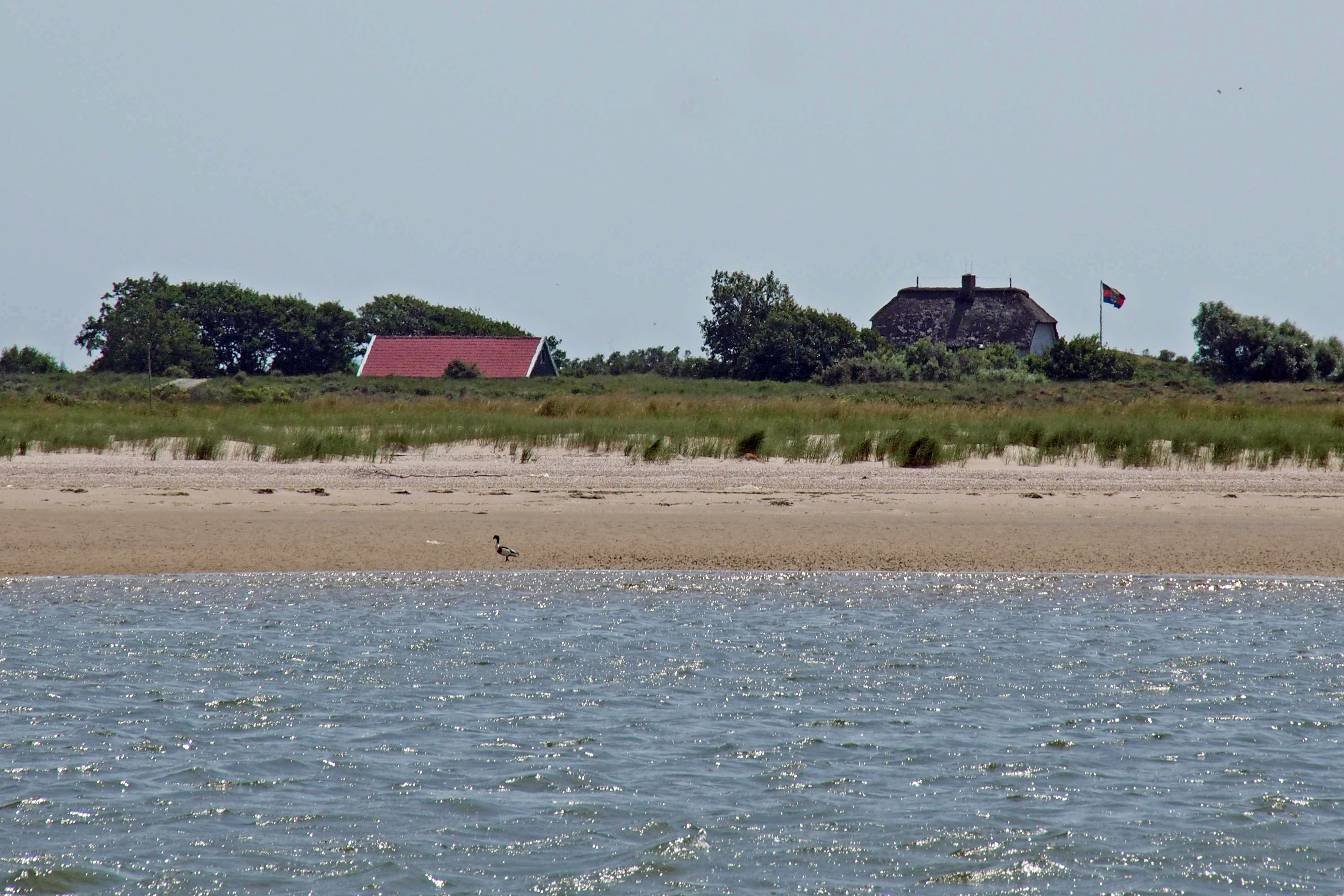 Wohnhaus des Vogeslwartes auf der Vogelschutzinsel Memmert